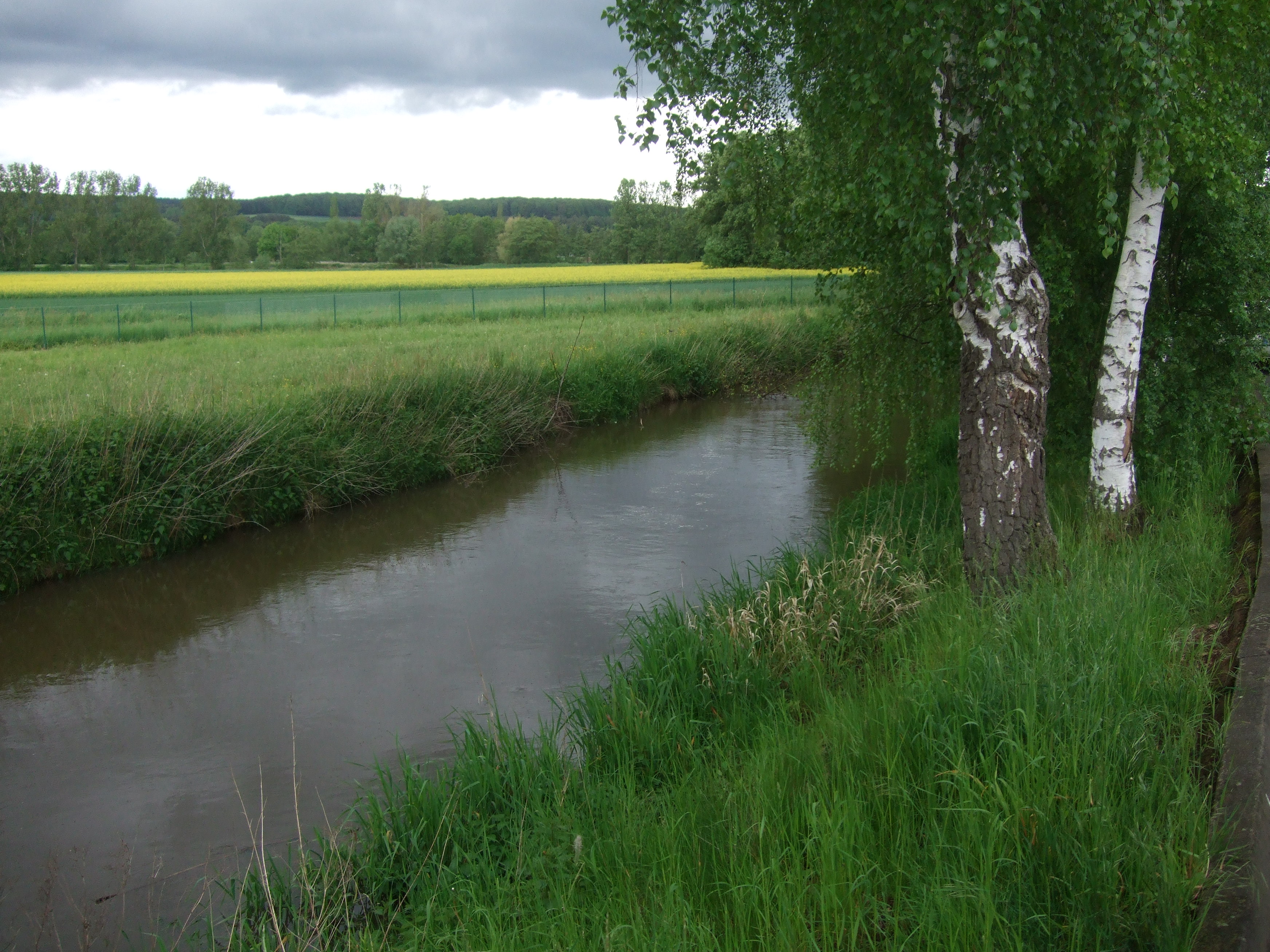 Die Mühlenwohra in Kirchhain